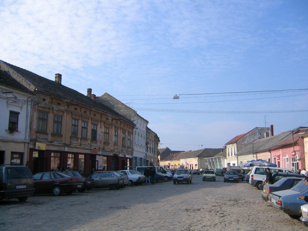 Strada Nicolae balcescu, Lipova. Aspect general din centrul orasului